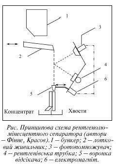 Зображення:Сепарація.JPG: Схема рентгенолюмінісцентного сепаратора